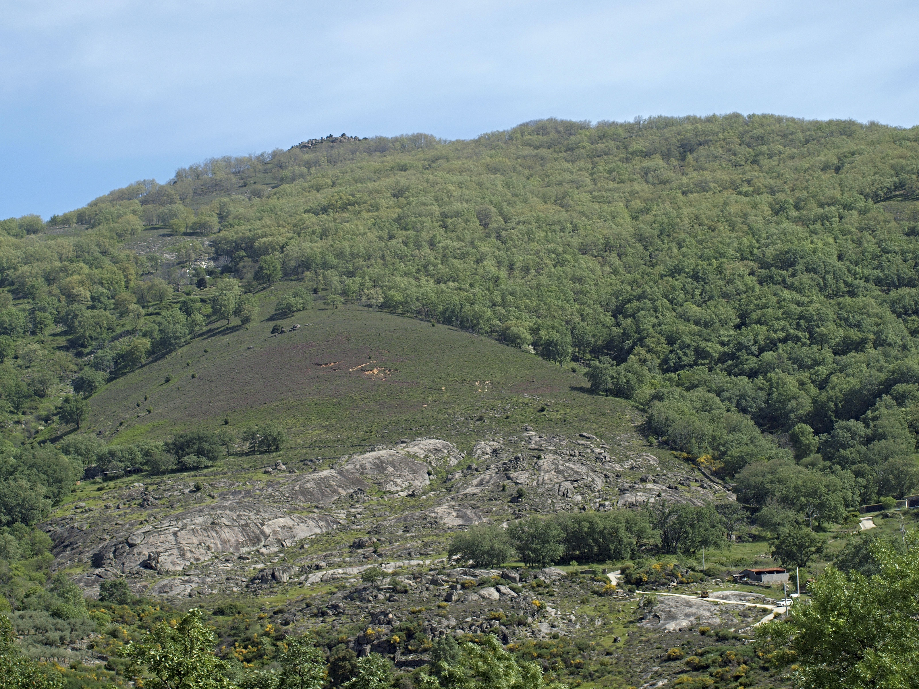 Quercus pyrenaica. Foliación diferenciada según la altitud a principios de mayo. Losar de la Vera (Cáceres, España).